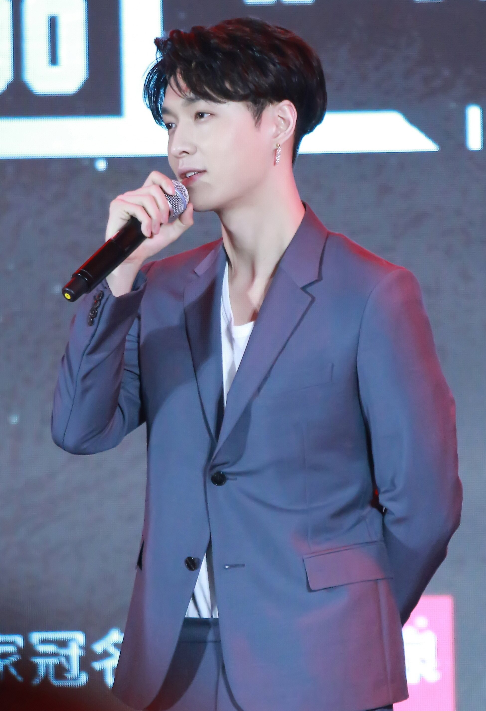 171217 偶像练习生发布会 张制作人您好！张艺兴